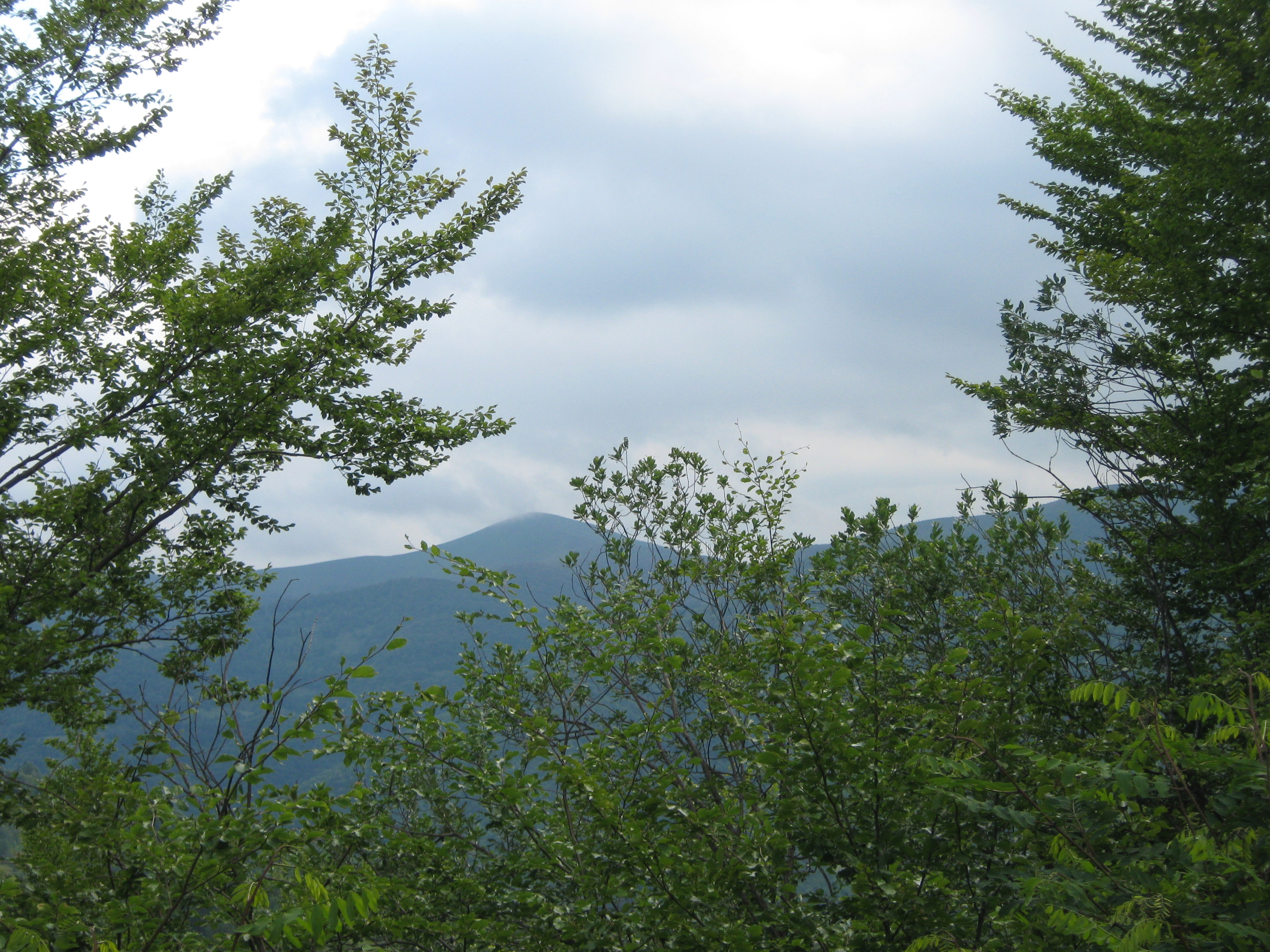 Veliki i Mali Strešer